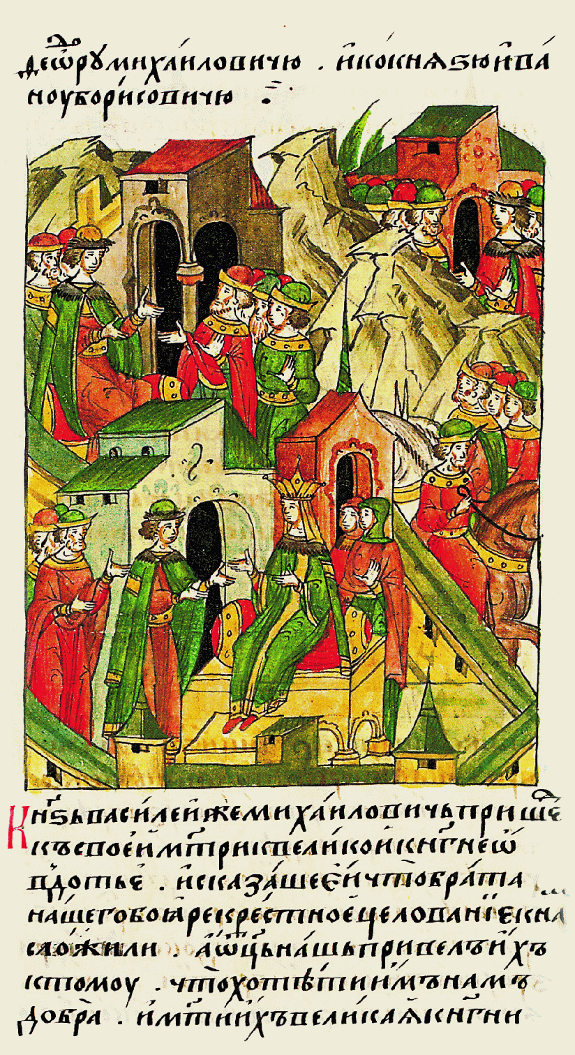 Князь Василий Михайлович пришел к сво- ей матери, к великой княгине Авдотье, и сказал ей, что «бояре брата нашего крестное целование сложили. А отец наш завещал, чтобы он был добр к нам». И мать их великая княгиня Евдокия (?-1 ноября 1404), дочь князя Суздальского Константина Васильевича.